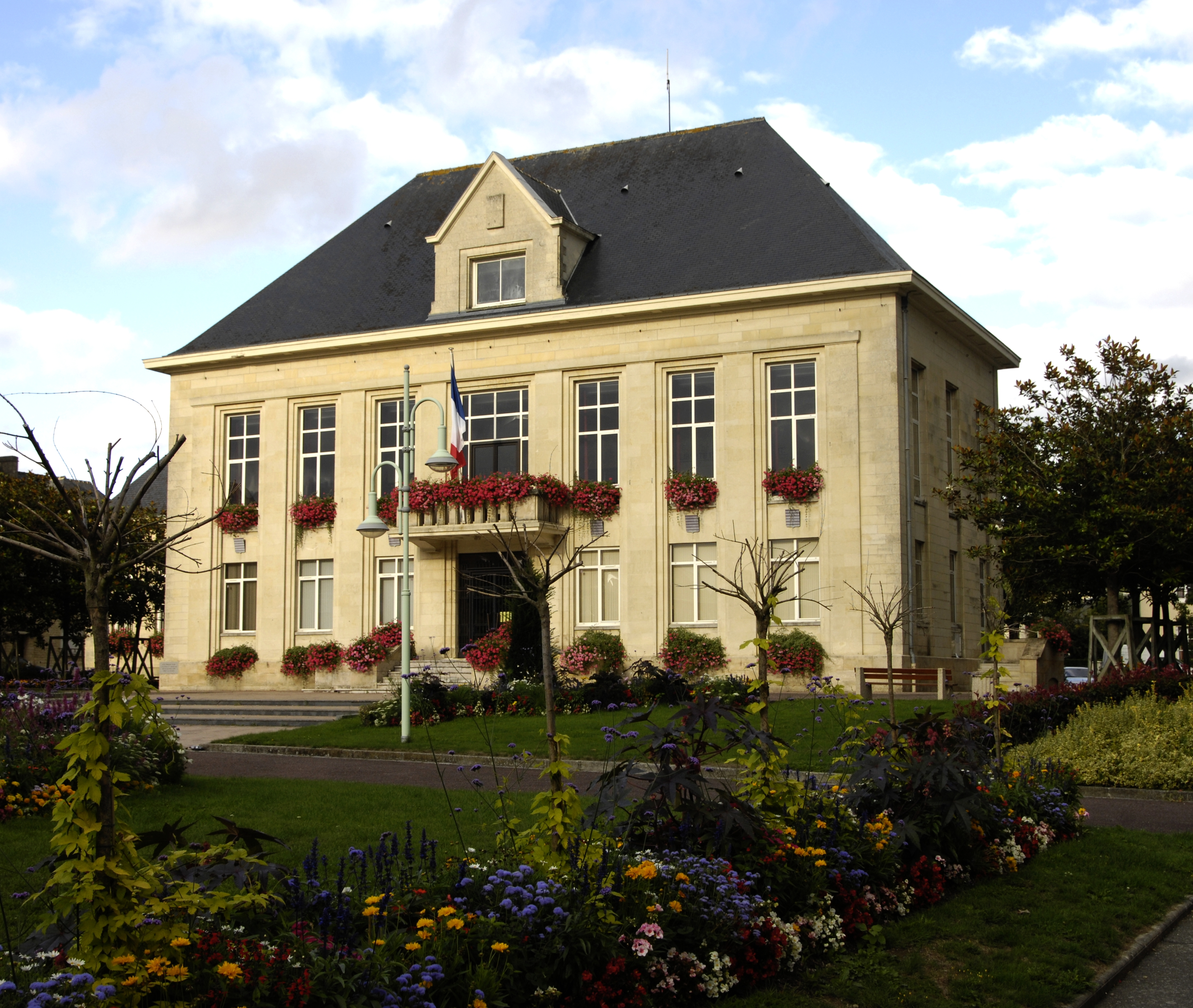 Aunay-sur-Odon Rathaus, Suisse normande (Calvados, Basse-Normandie).